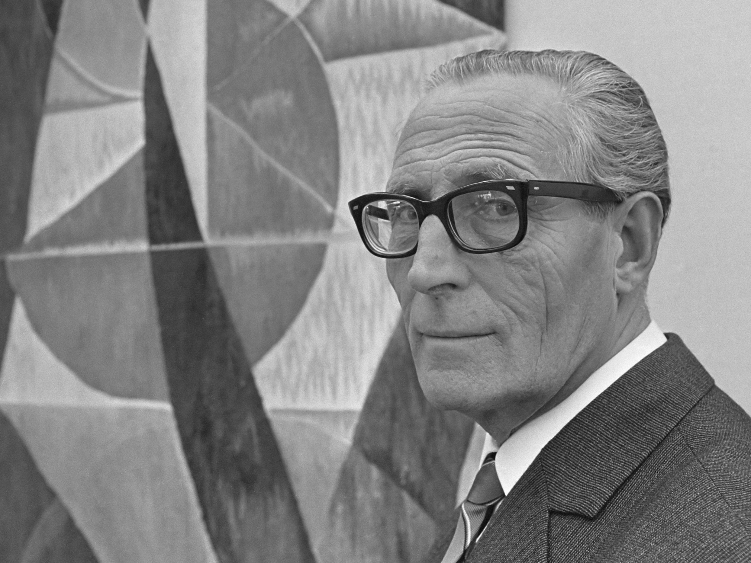 Tentoonstelling Chris de Moor . Chris de Moor 22 augustus 1967